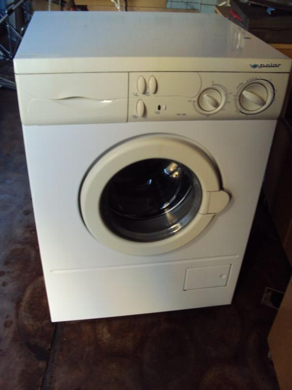 Oto pralka Polar PDT 585, która pochodzi gdzieś z 2000 r. To nie jest zbyt udany model Polara.